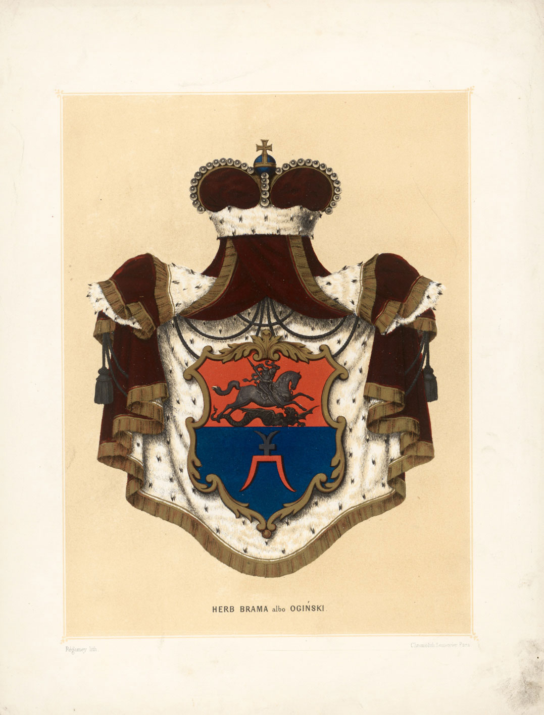 Беларуская (тарашкевіца): Герб князёў Агінскіх (Aginski)